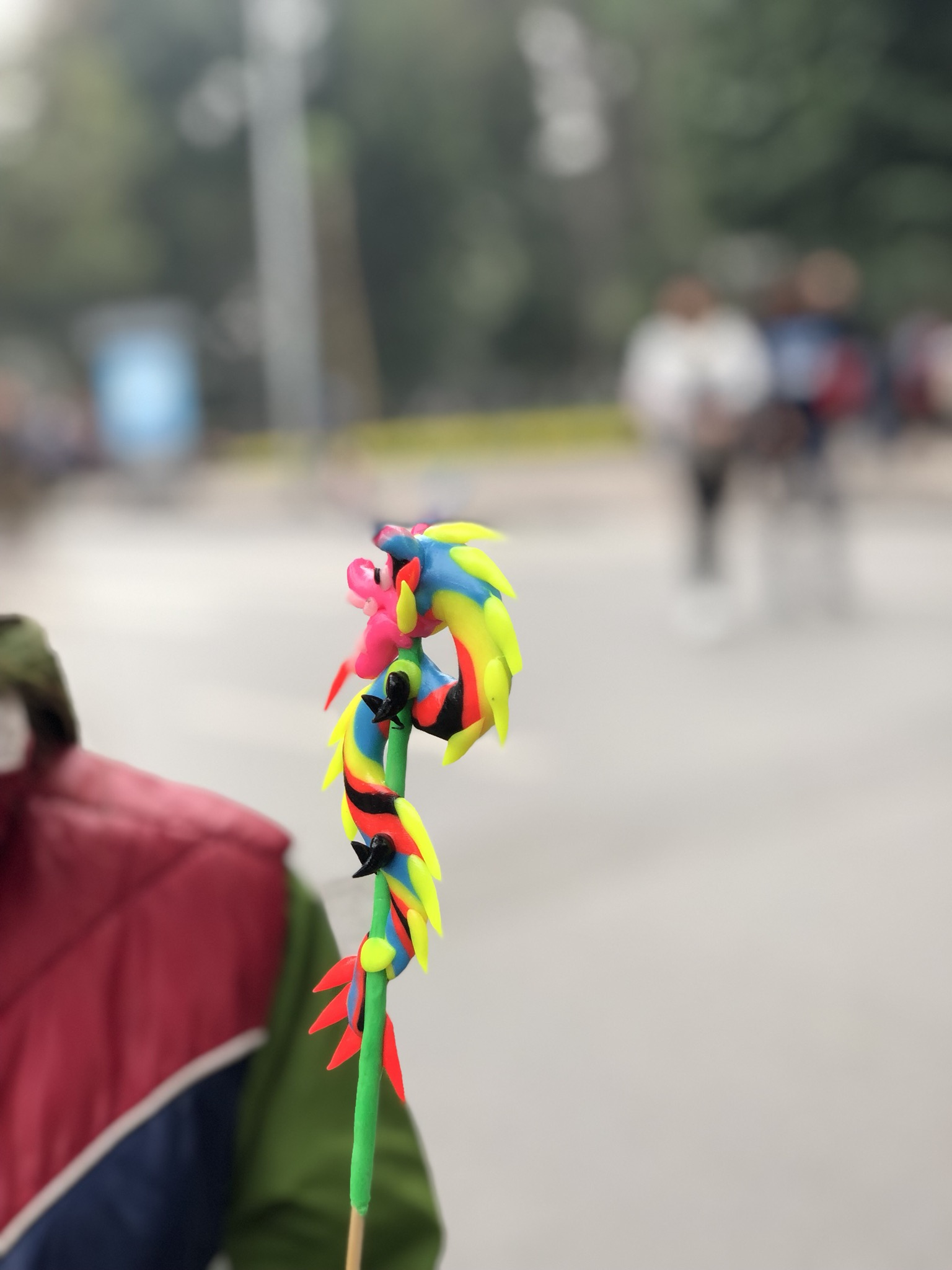 Tò he hình con rồng Việt Nam của Trương Hoàng Khánh Ngọc tại phố đi bộ Hồ Gươm